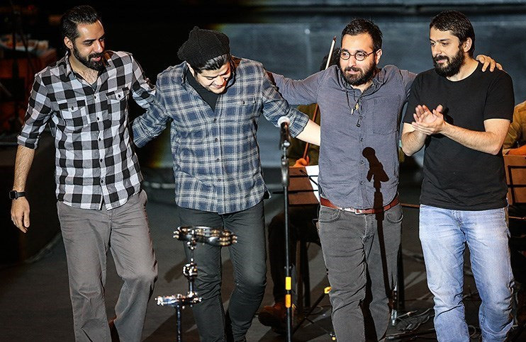 Chaartaar concert in Milad Tower, Nowruz 1395.